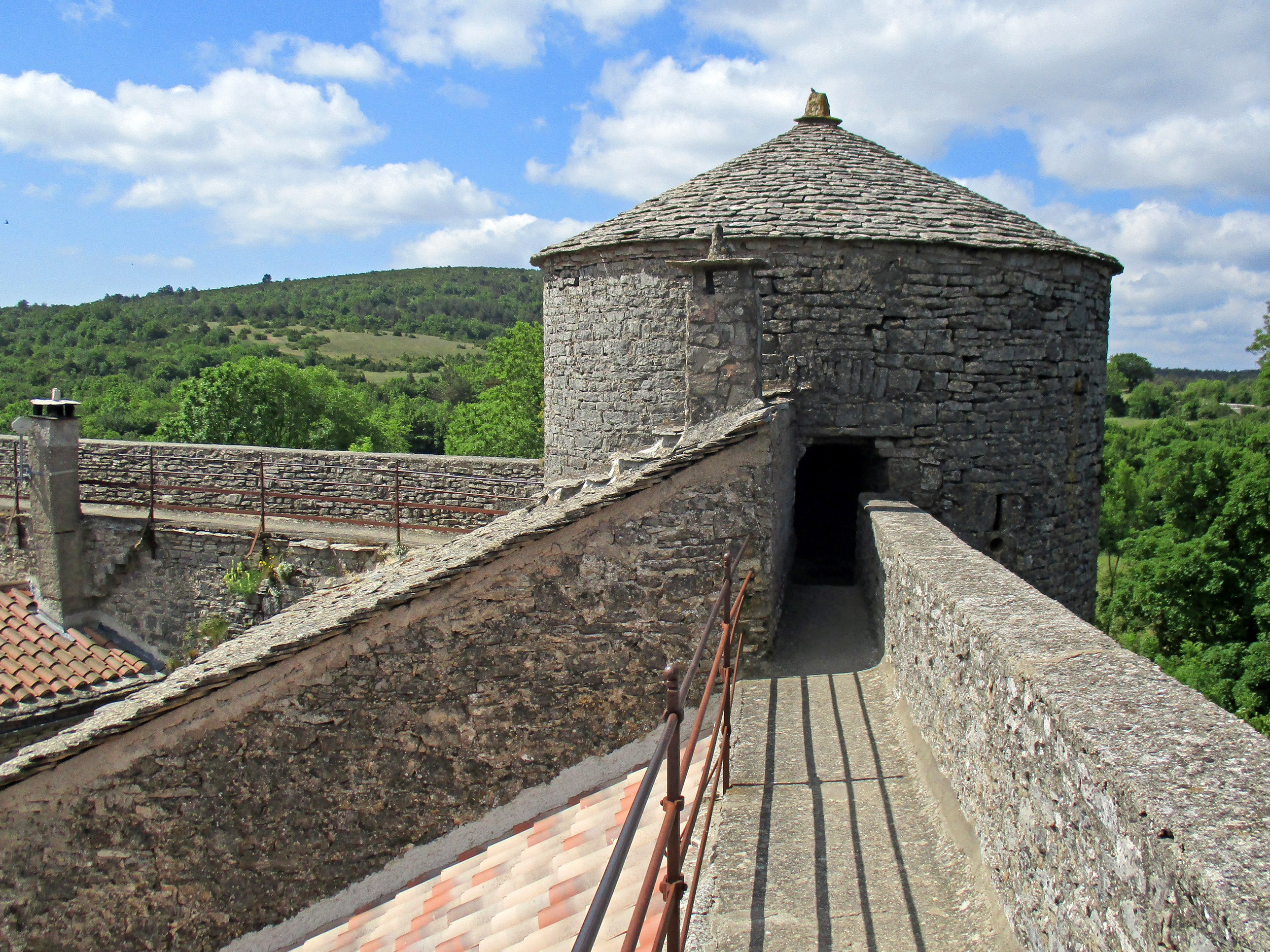 Anciens remparts à La Couvertoirade, Aveyron, France .